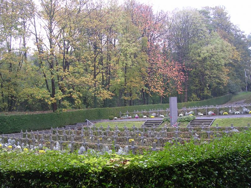 Ereveld der Gefusilleerden, Schaarbeek